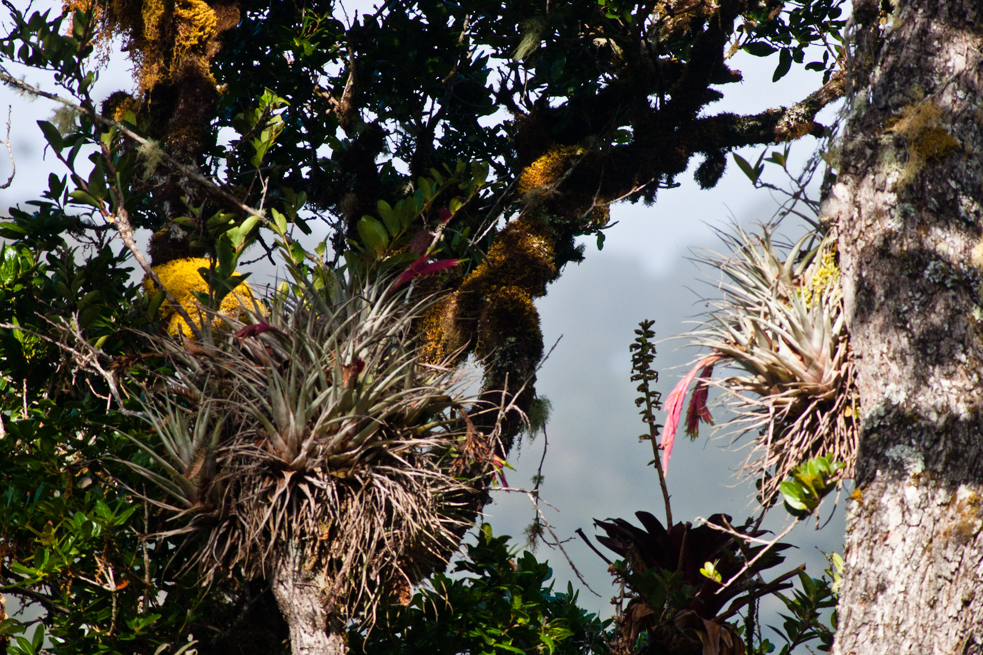 Vriesea williamsii & Vriesea castaneobulbosa på Quercus costricensis-0940